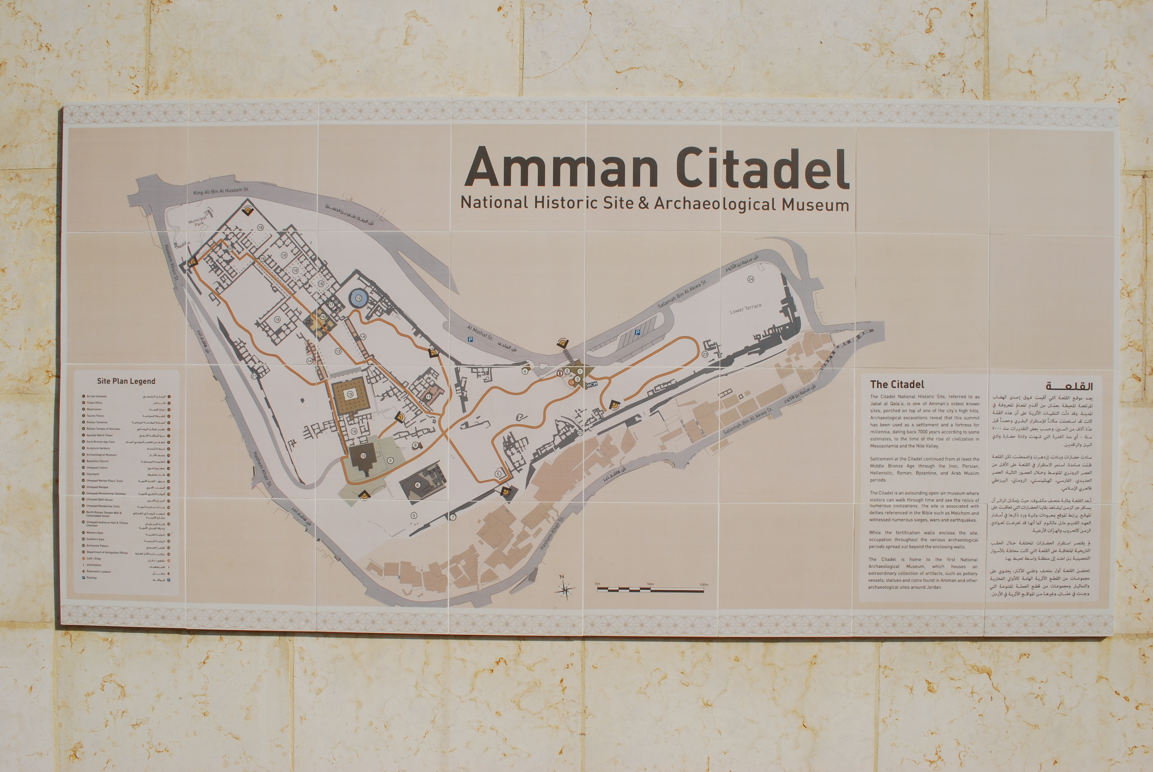 La citadelle d'Amman : plan à l'entrée du site archéologique.